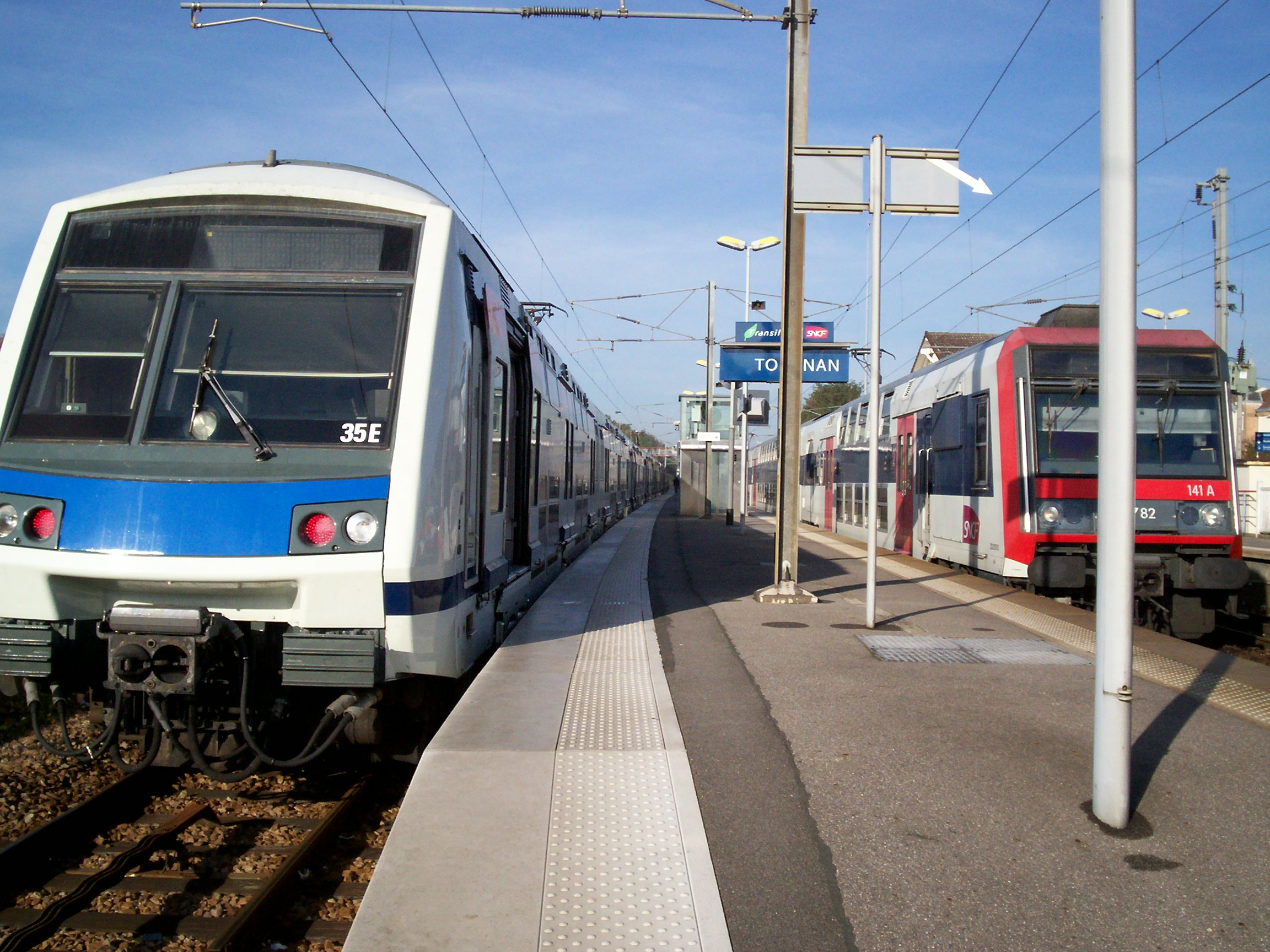 2 trains, le RER à gauche et le Transilien, pour Coulommiers, à droite